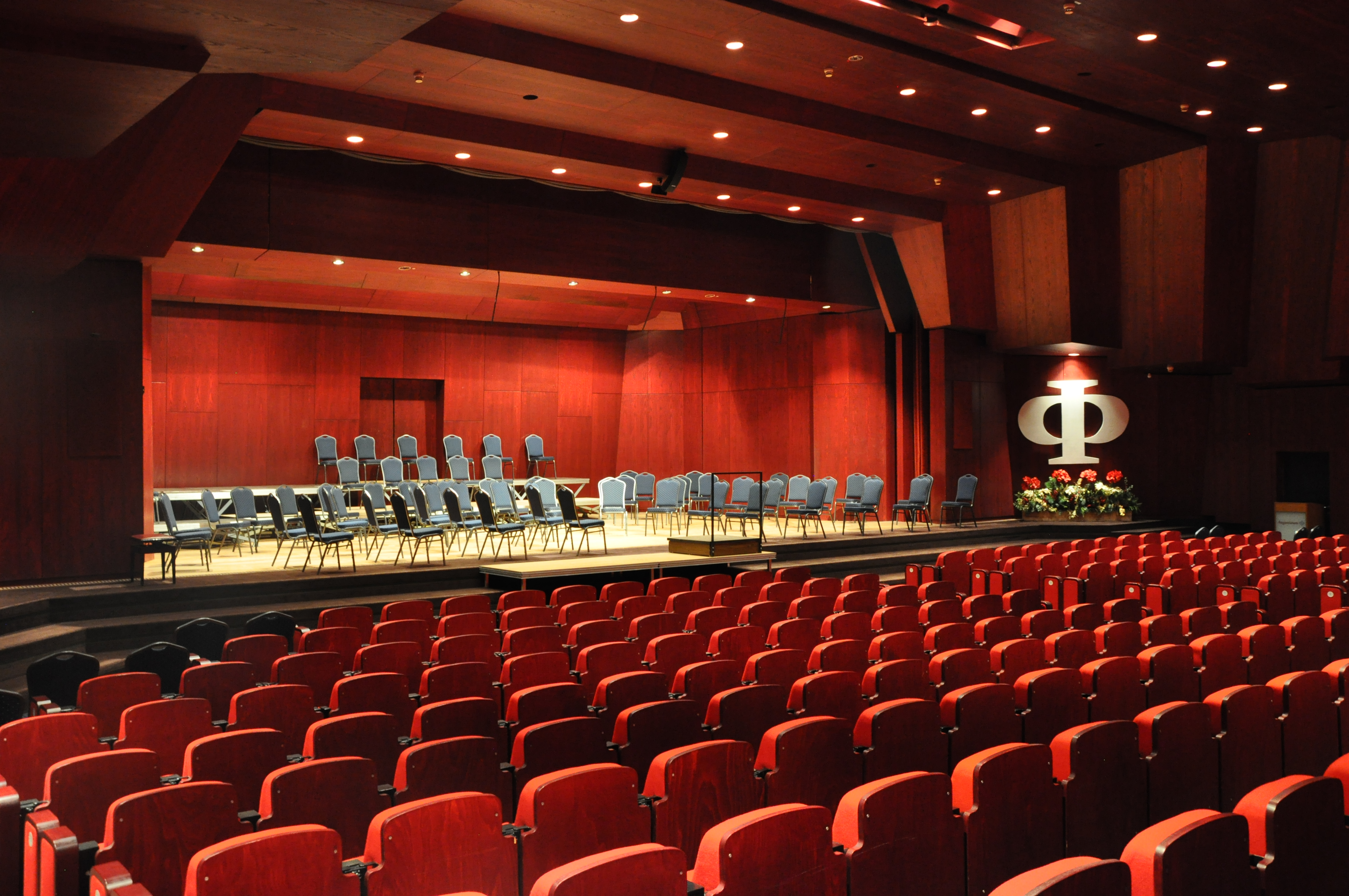 Theater-, Kino- und Konzertsaal im Augustinum Heidelberg